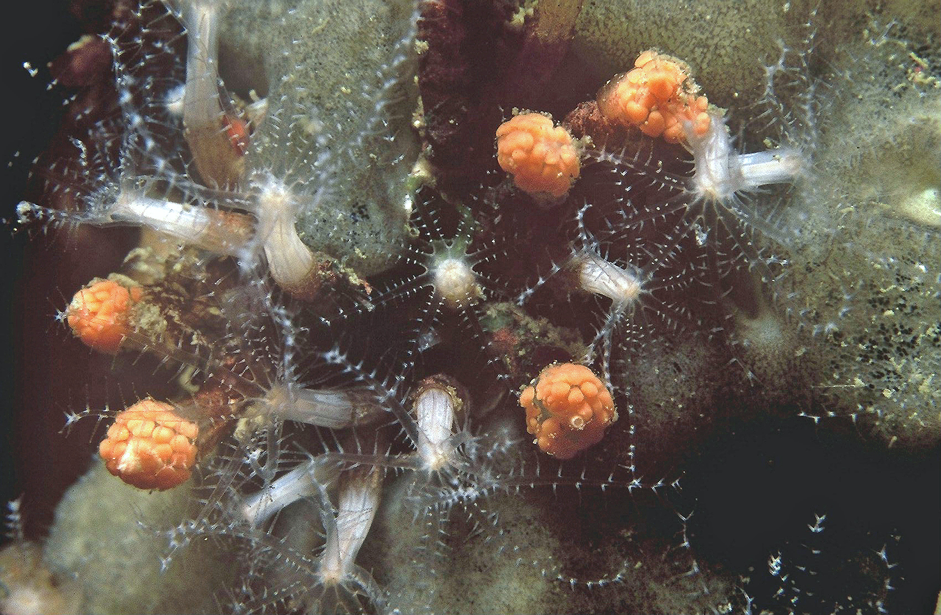 Clavularia crassa (Milne-Edwards, 1848) oeufs - Banyuls-sur-Mer : 07/88